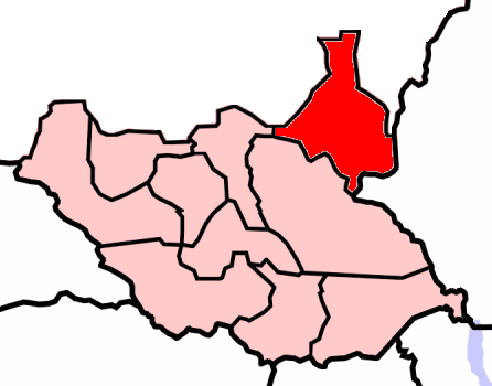 Provinz des Sudan, die rot eingefärbt ist